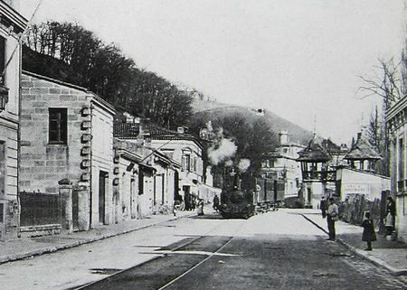 Le tram dans la montée de Monrepos.